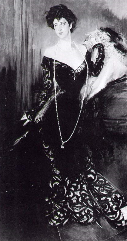 Donna-Florio-ritratta-da-Bondini-nel-1901.-Fotografia-della-prima-versione-esposta-a-Venezia